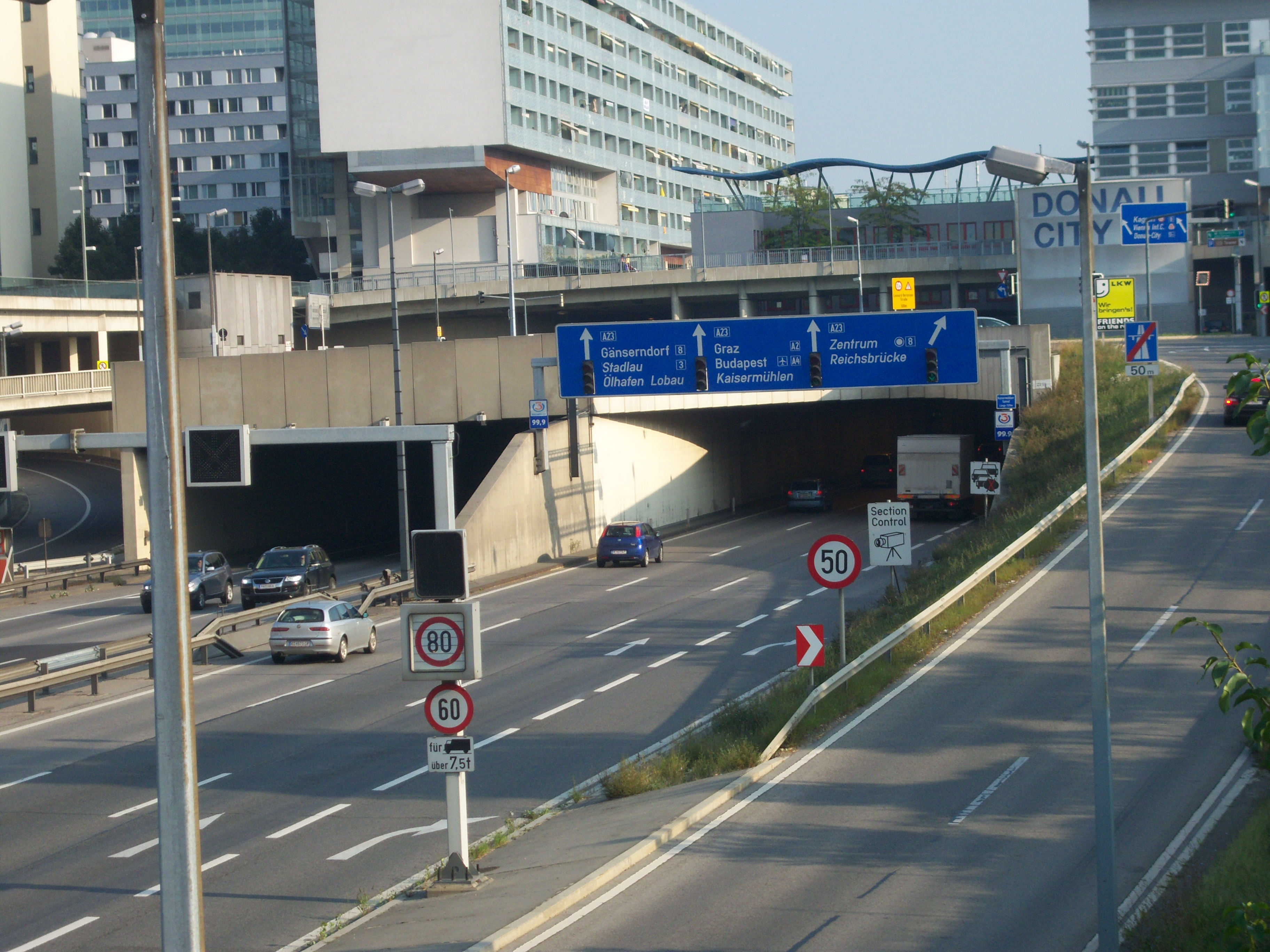 Tunnel Kaisermühlen (Westportal) im Zuge der A22